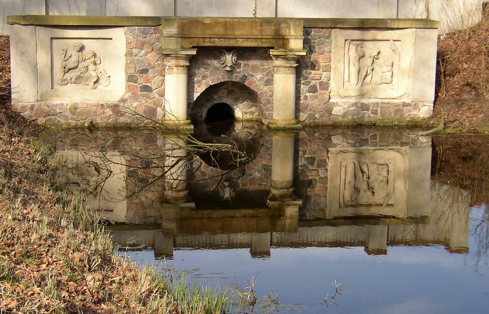 Quellfassung im Schlosspark Steinhöfel in Brandenburg, Germany